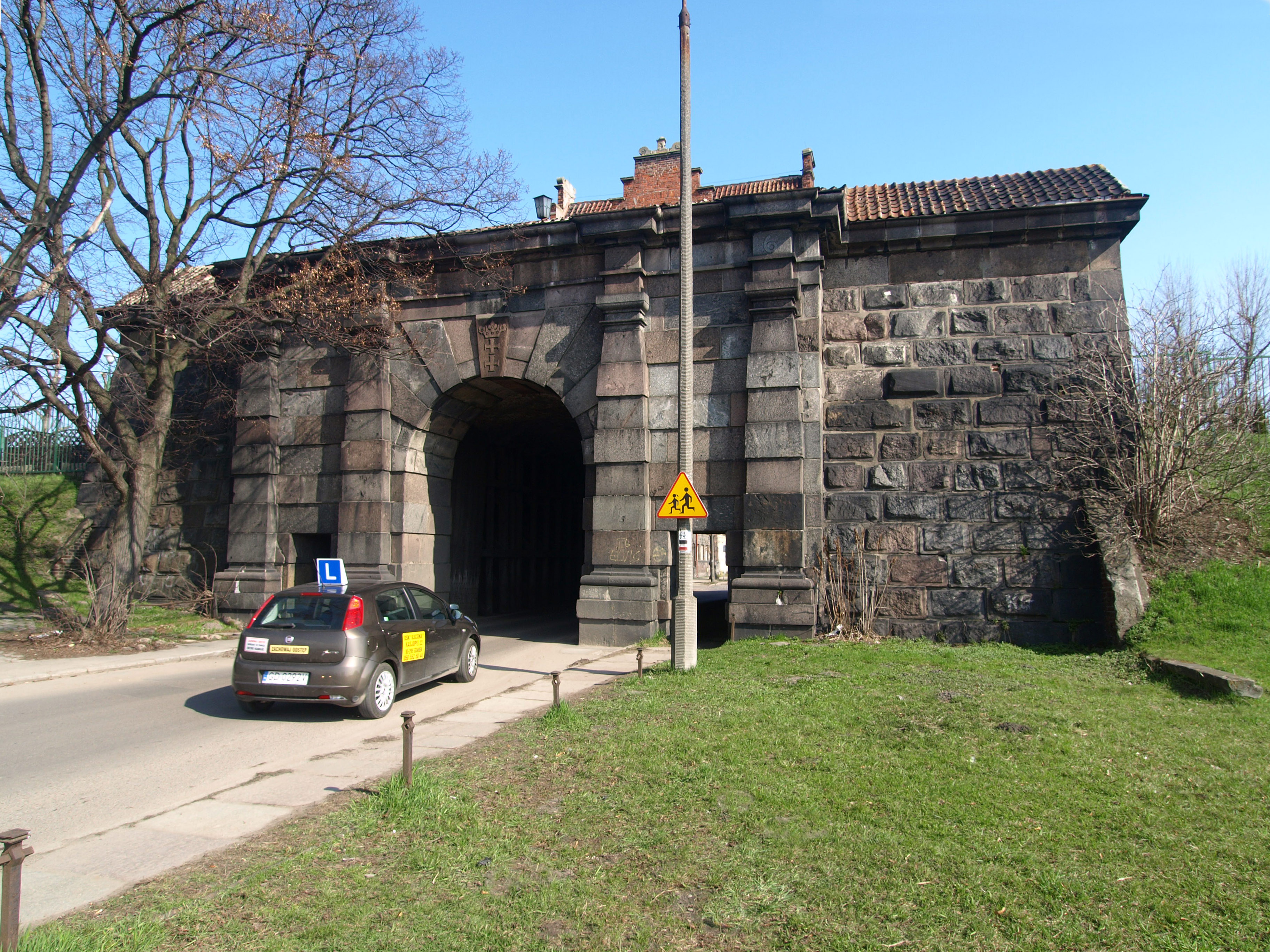 Gdańsk Stare Przedmieście, ul. Mostowa / Dolna Brama - Brama Nizinna, XVII